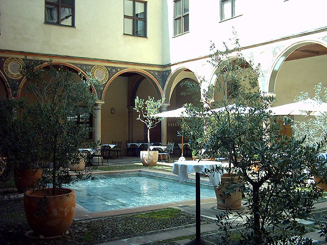 Augsburg (Bayern): Damenhof im Fuggerschen Stadtpalais, ein klassisches Beispiel für Renaissance-Architektur... Bildautor: Peter Bubenik - Aufnahmedatum: 03.09.2004